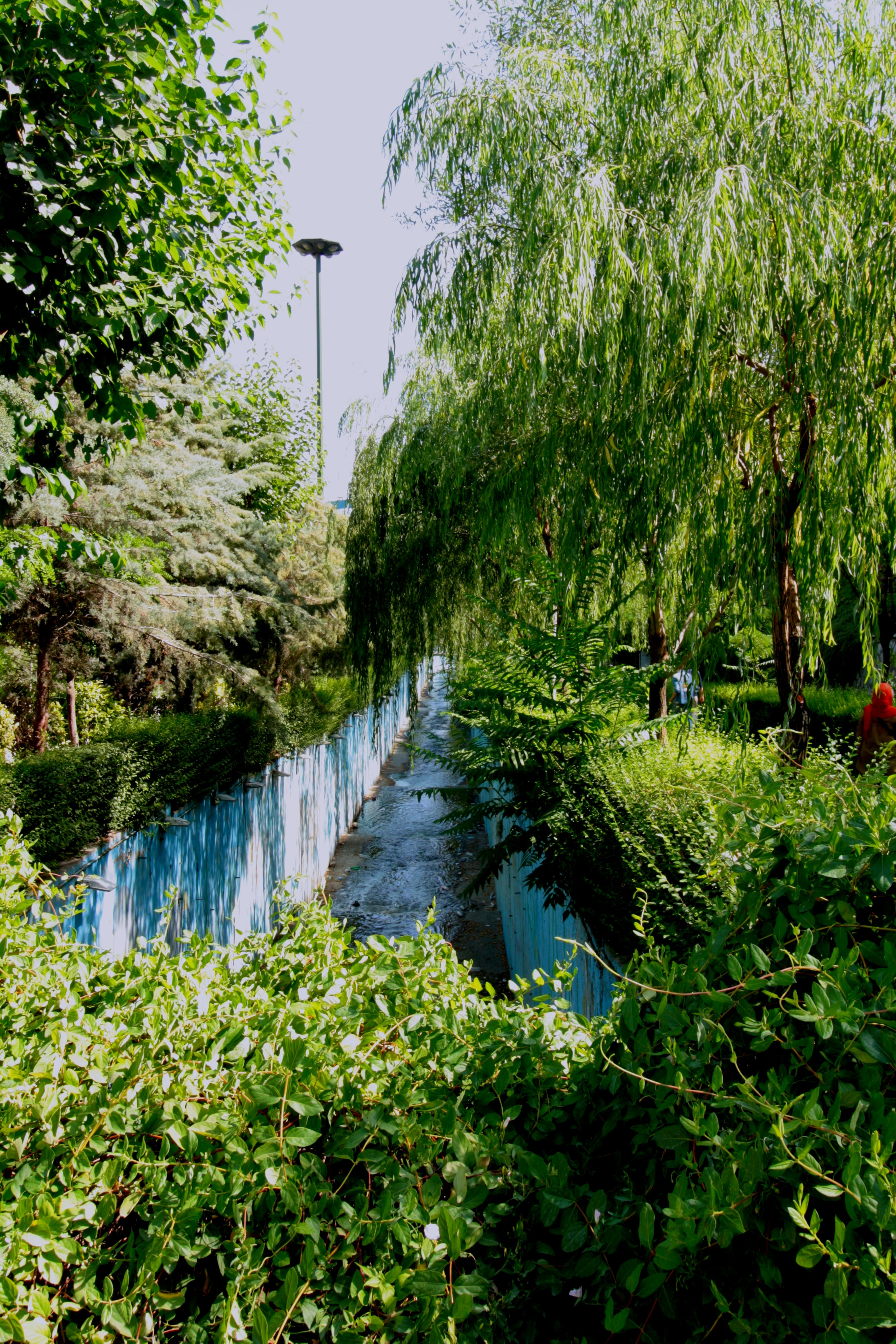 Nahjul Balagha Park